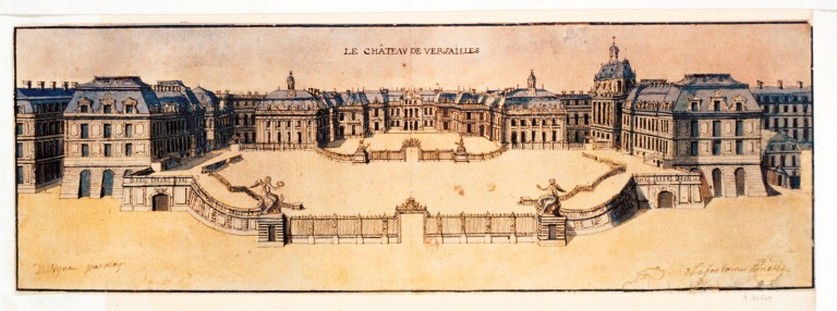 Le château de Versailles - Dessin de Lafontaine (16..–17..)